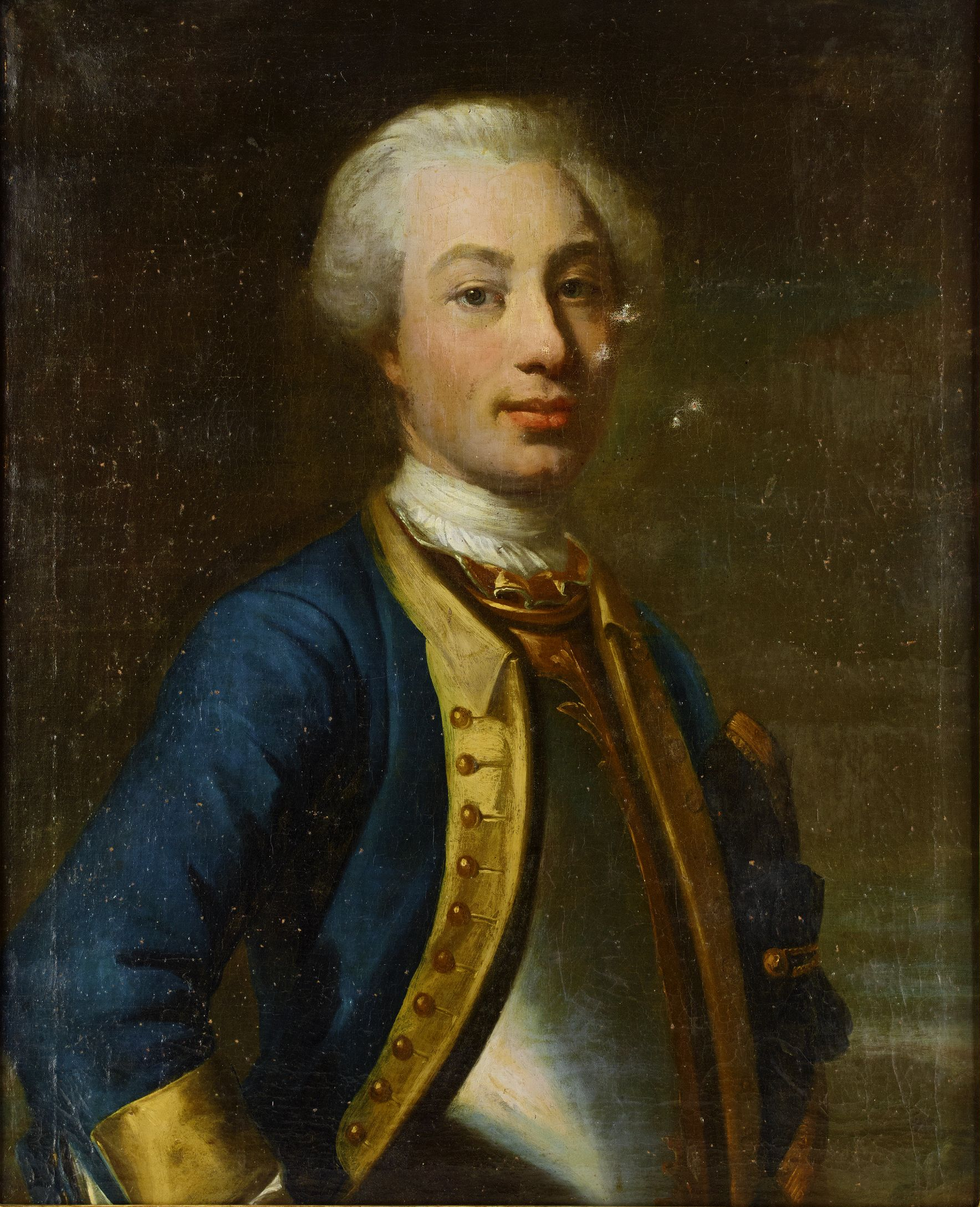 Porträtt föreställande generalmajor Cornelius Loos (1686-1738). Loos är iklädd bröstharnesk med förgyllda beslag och blå uniformsrock med gul krage, gula uppslag och förgyllda knappar, guldgalonerad trikorn under vänster arm